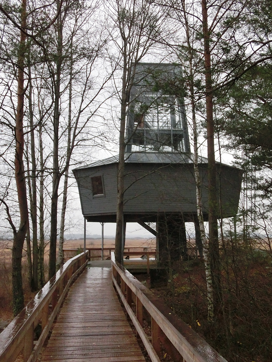 Fågeltornet i Store Mosse nationalpark, Kävsjö socken, Gnosjö kommun, Jönköpings län, Småland, Sverige.